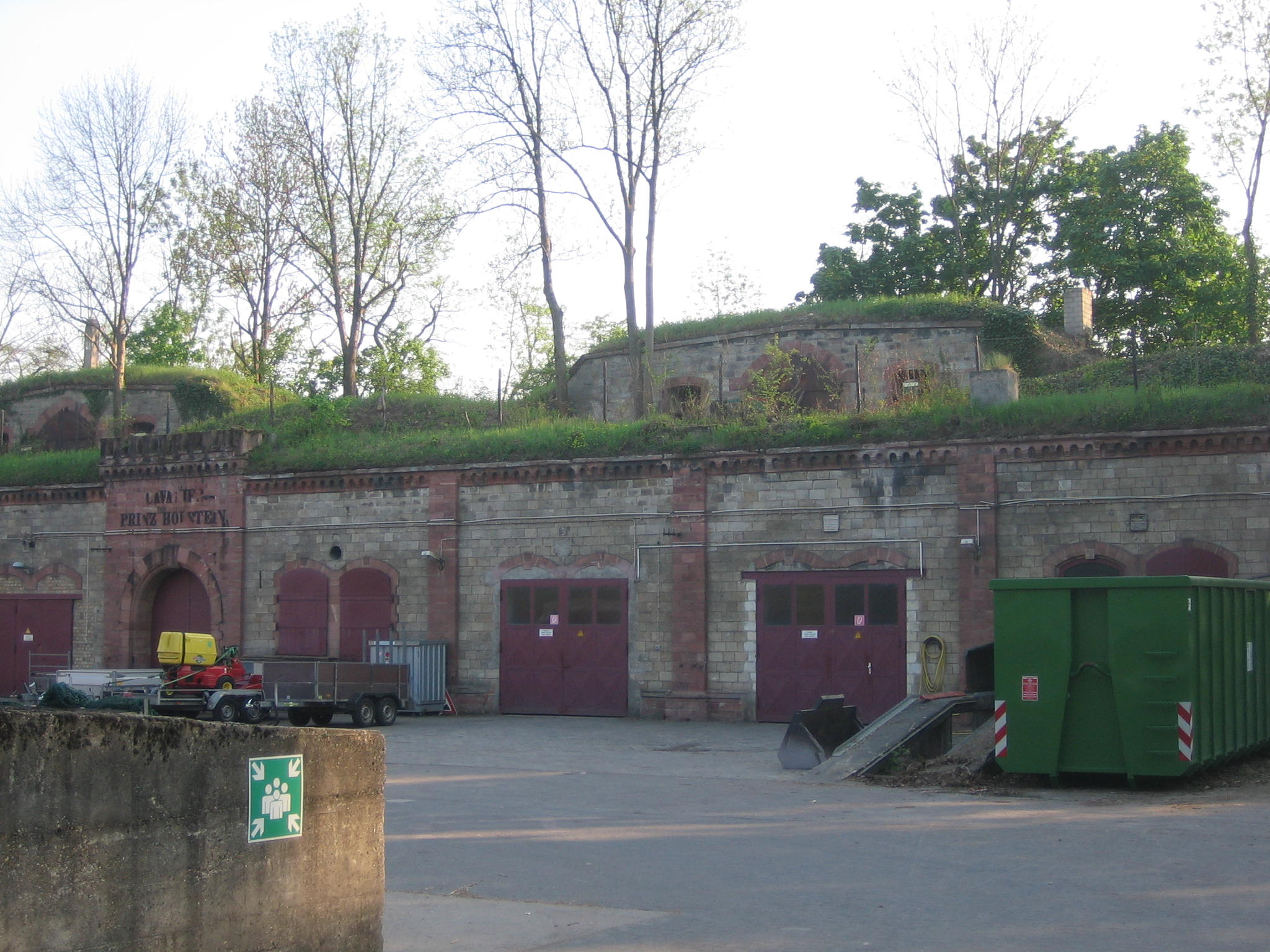 Cavalier Prinz Holstein des Rheingauwalls der Festung Mainz; zur Zeit als Depot durch das Grünamt der Stadt Mainz genutzt.